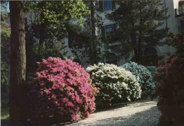 Parte della collezione di Azalee conservata nel Giardino dei Semplici di Firenze